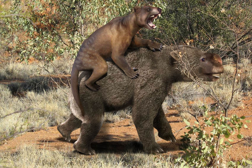 Thylacoleo